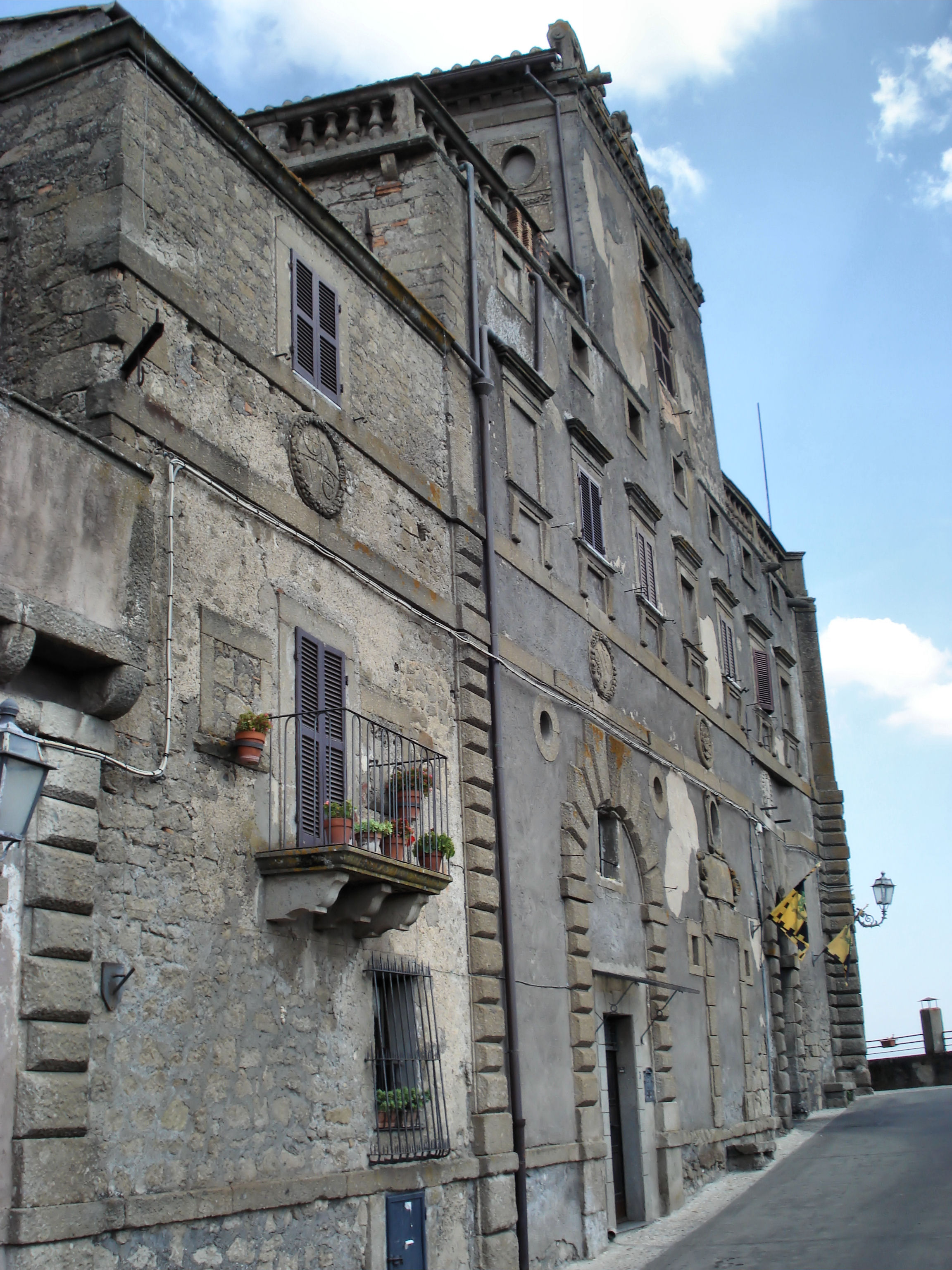 Cosmin latan,Palazzo Orsini Licensing Categoria:Immagini esclusivamente in GNU FDL